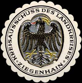 Sealing stamp Title: Kreisausschuss des Landkreises Ziegenhain Description: bunt, geprägt Place: Ziegenhain size: 4 cm